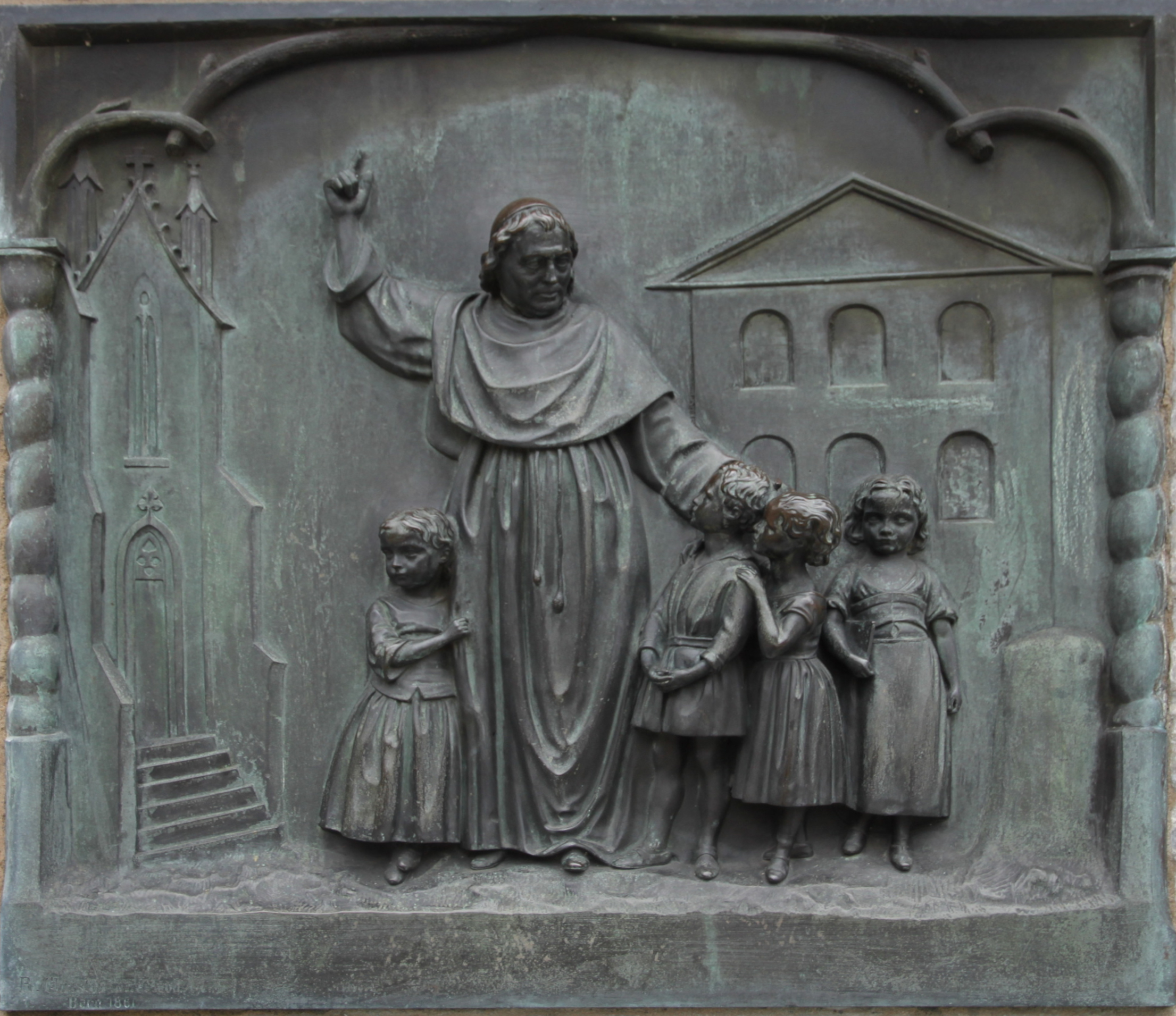 Père Girard, der Erzieher umgeben von Kindern, Relief, 1861, von Raphael Christen von Wolfenschiessen (Unterwalden), auf dem Girard-Denkmal in Freiburg i. Üe.